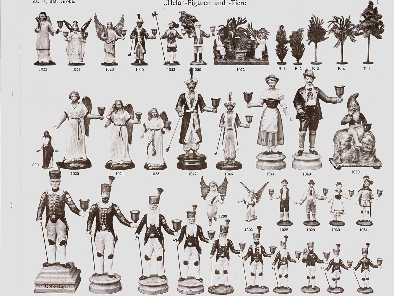 Seite aus dem Originalkatalog von 1924